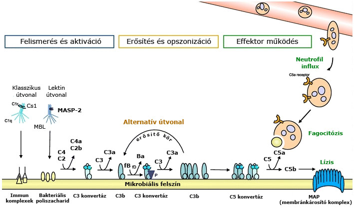 Általános működési elv